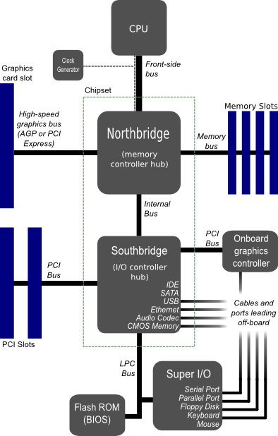 Diagrama de arquitetura de computador